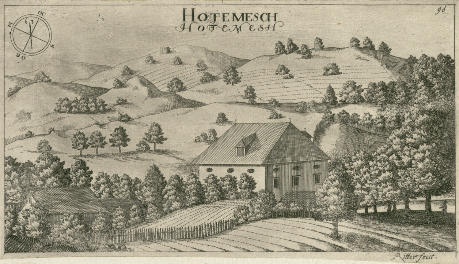 Dvorec Hotemež